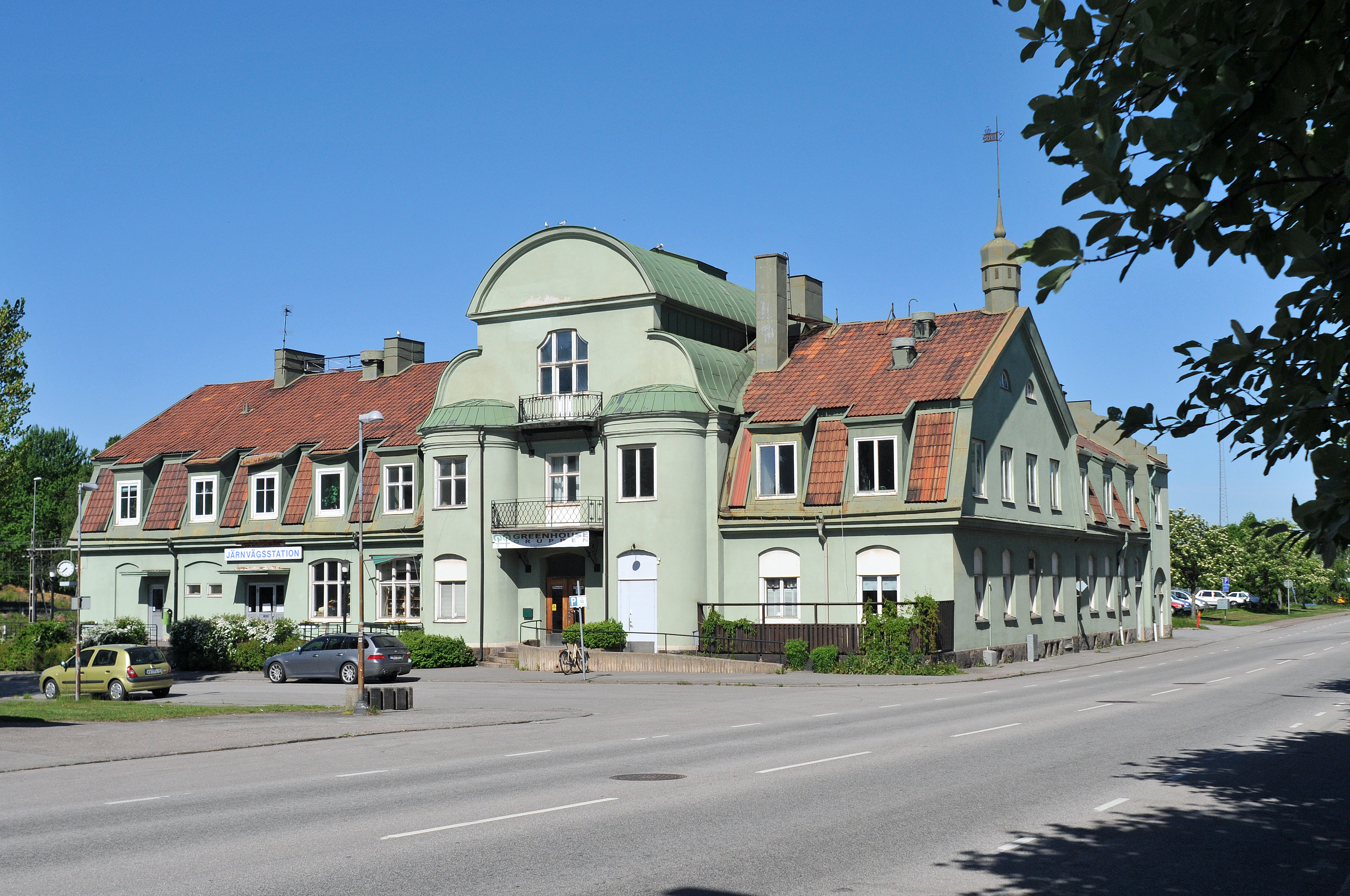 Oxelösunds tidigare järnvägsstation. Uppfört som Turist- och Järnvägshotell 1905